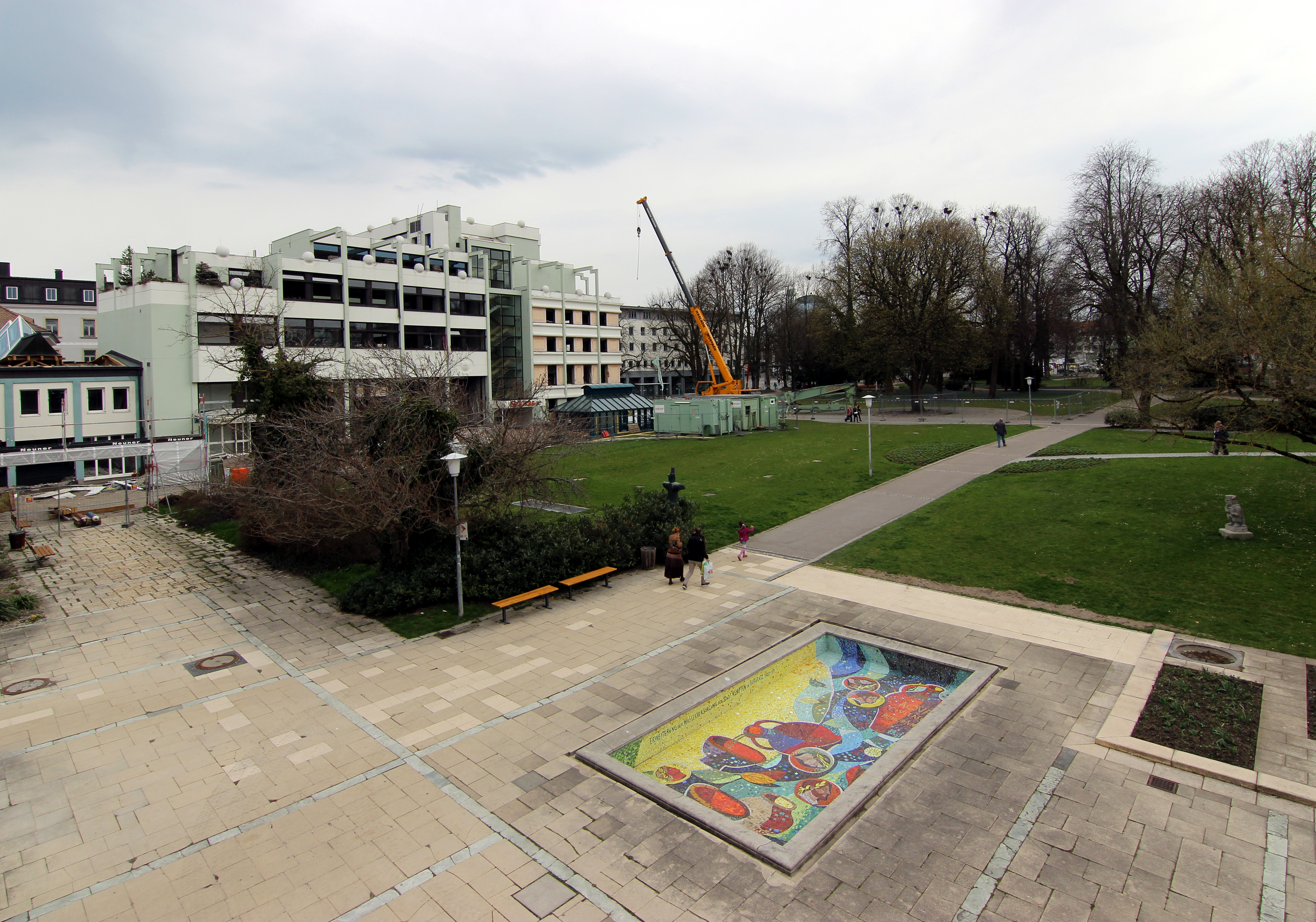 Zumsteingarten mit Stadtpark vom Zumsteinhaus aus Kempten